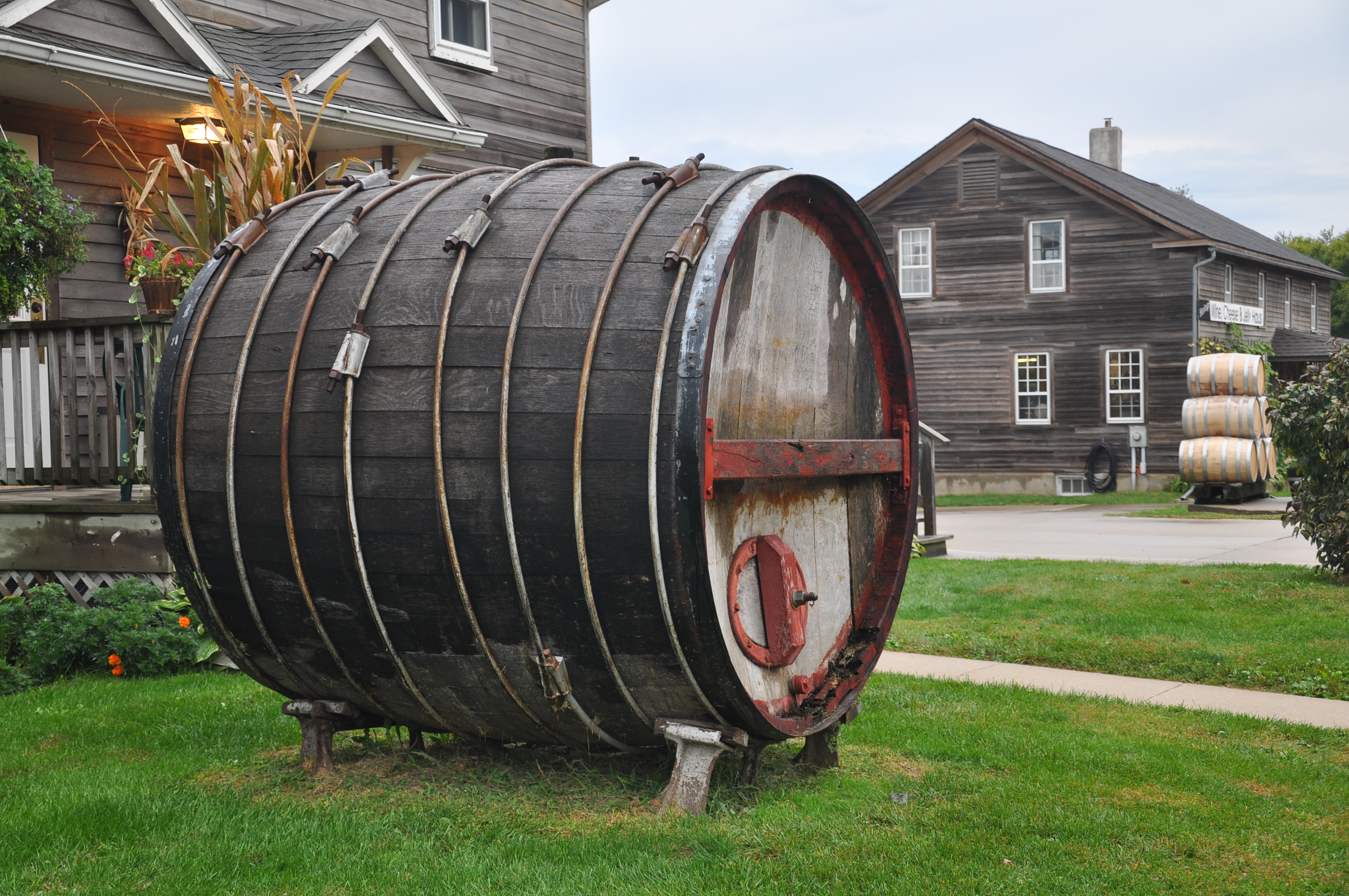 Akerman Winery Haus Amana IA